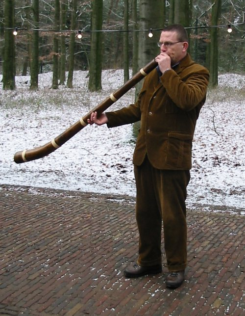 Blazen op een Midwinterhoorn. Fotograaf: J.A.C. de Kroon. Gemaakt op 27-12-2005 in het Openluchtmuseum te Arnhem